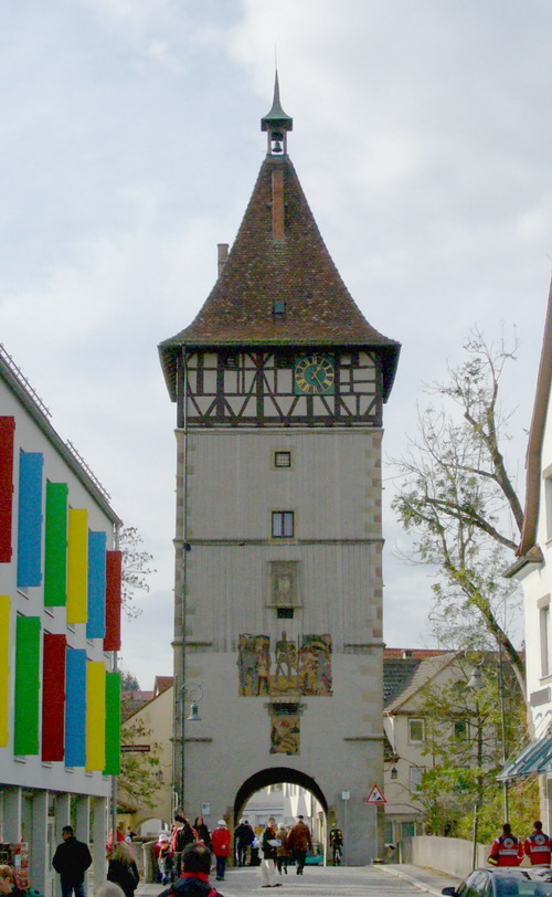 Waiblingen, Beinsteiner-Torturm